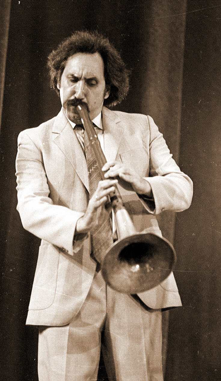 Дмитрий Покровский на концерте, 1988 год.